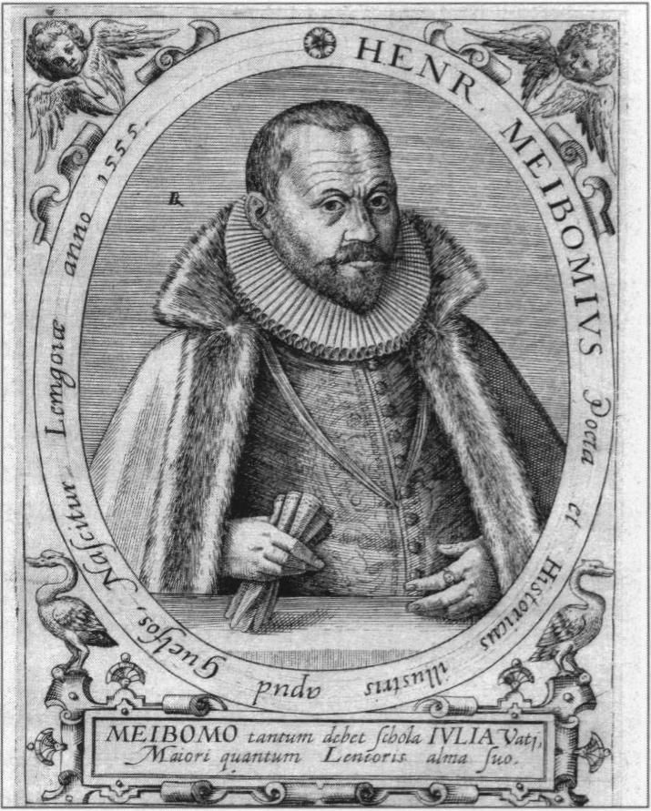 Heinrich Meibom der Ältere (1555-1625); Kupferstich / copper engraving 1600